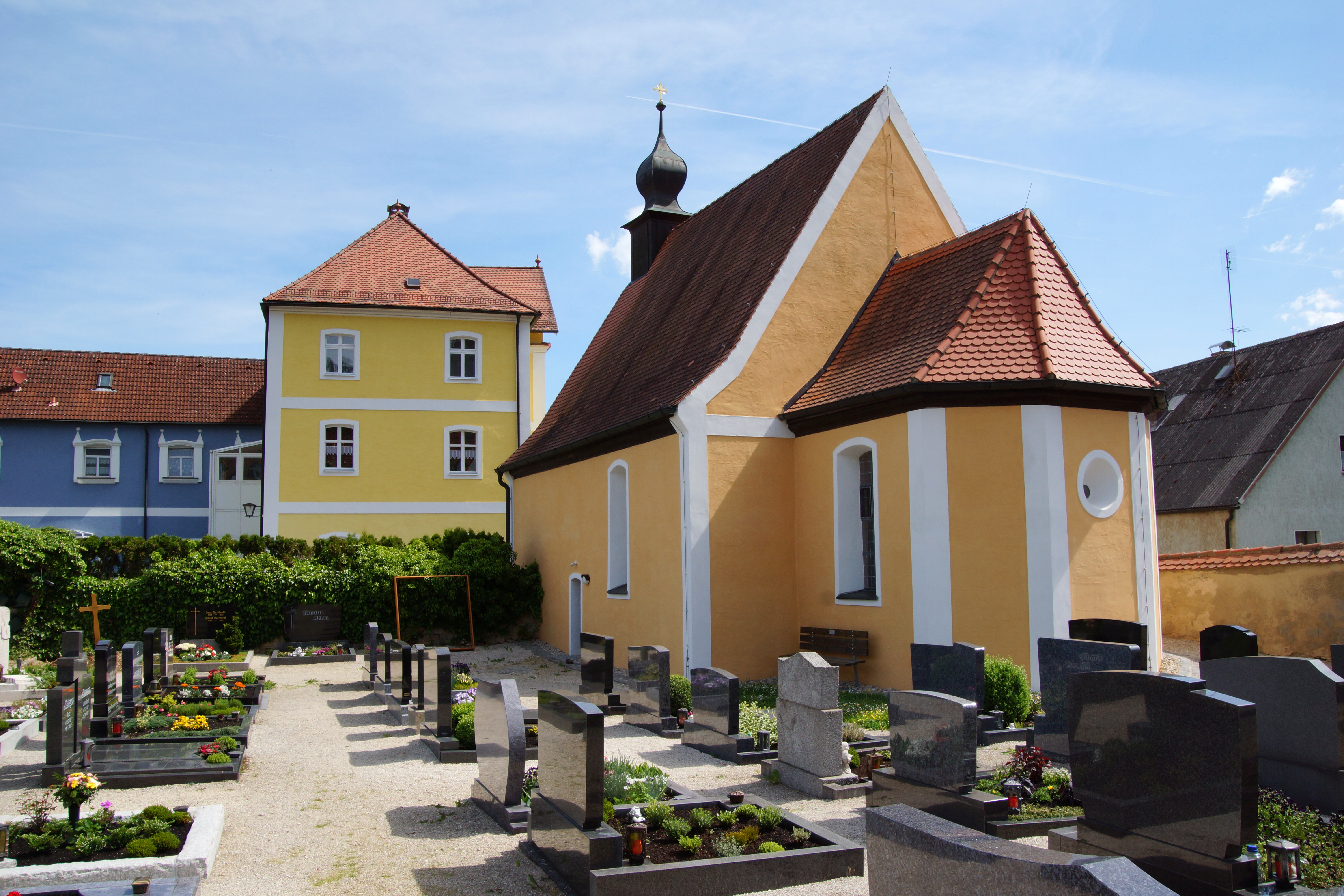 Die Friedhofskirche St. Georg in Schmidmühlen in der Oberpfalz